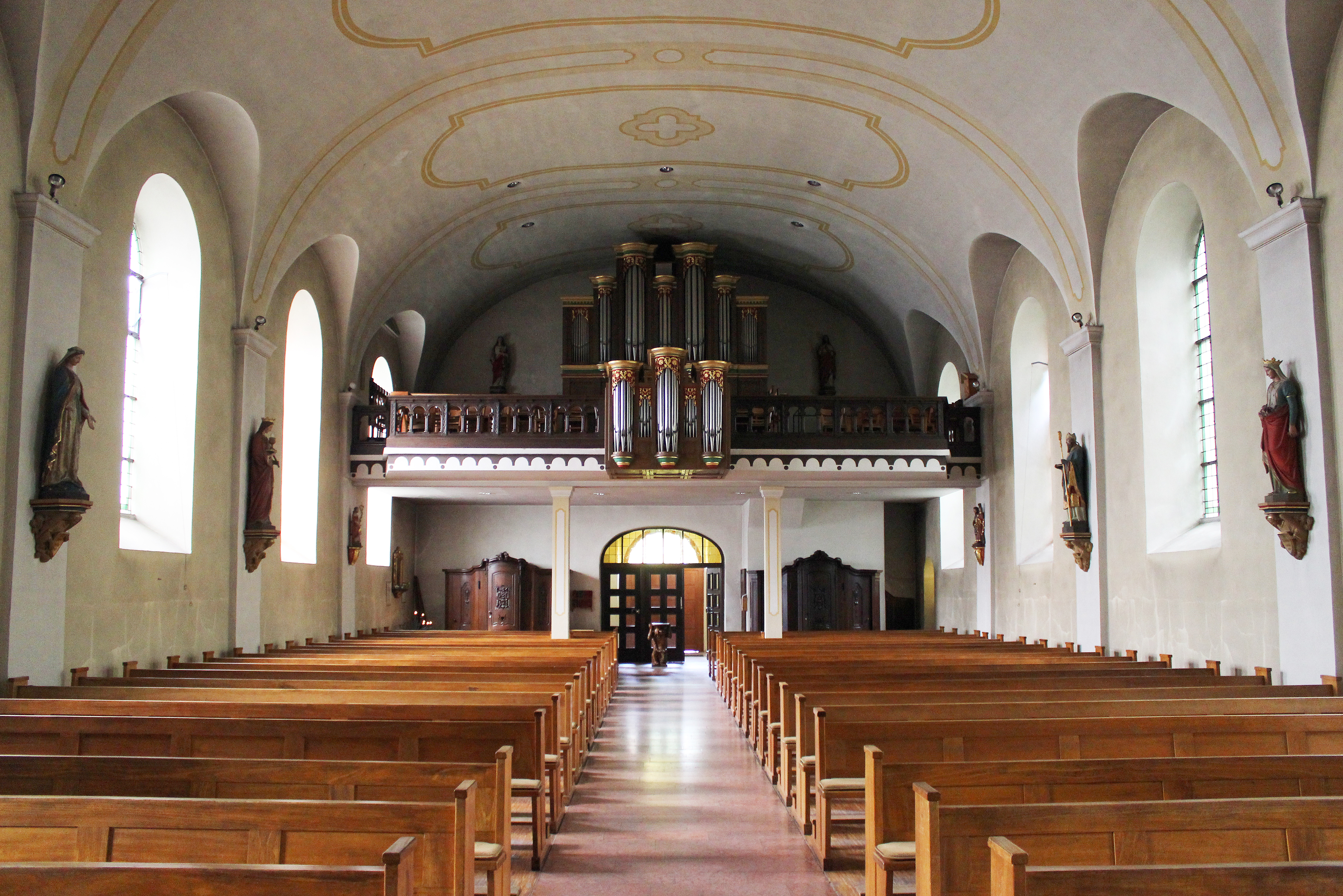 Blick ins Innere der katholischen Pfarrkirche St. Peter und Paul in Nalbach, Landkreis Saarlouis, Saarland